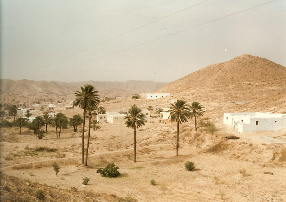 Paysage de Matmata (Tunisie)